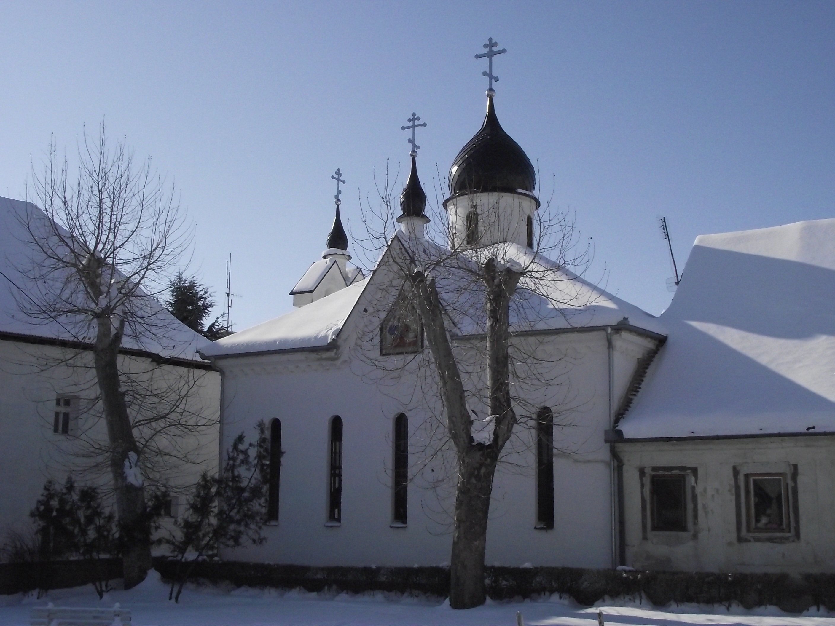 Ruska pravoslavna crkva u Beloj Crkvi (Banat-Srbija). Februar 2012. autor: Emanuel Veverica.